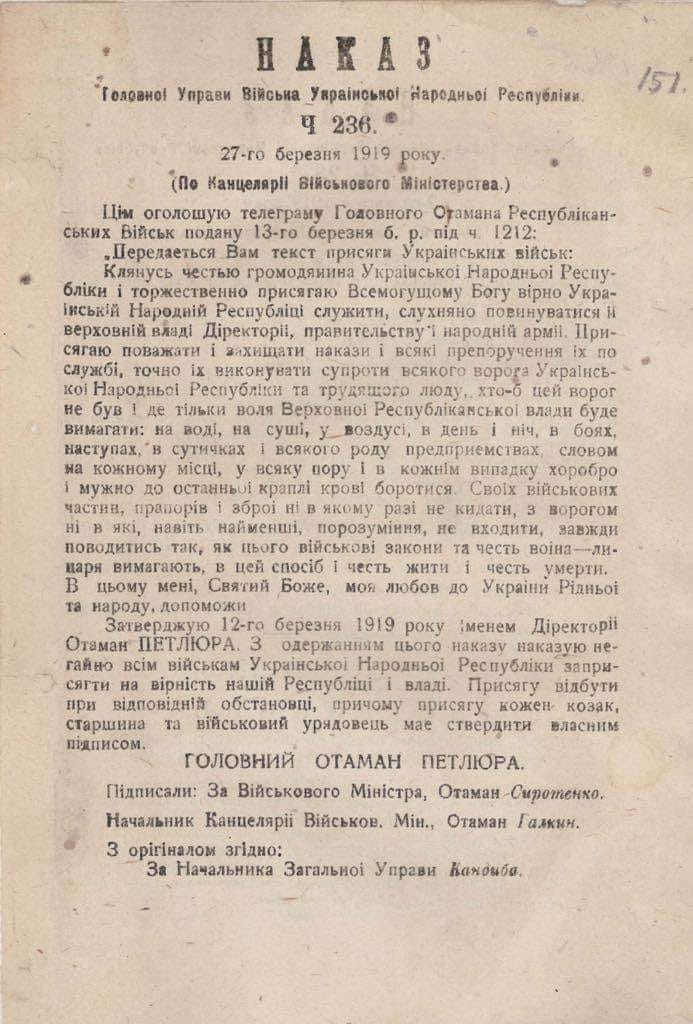 іменем Директорії у Вінниці отаман Симон Петлюра затвердив присягу вояка армії Української Народної Республіки.